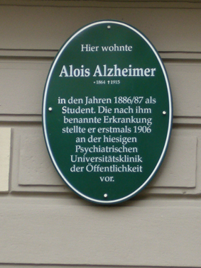 Schild in Tübingen: Hier wohnte Alois Alzheimer in den Jahren 1886/1887 als Student. Die nach ihm benannte Erkrankung stellte er erstmals 1906 an der hiesigen Psychiatrischen Universitätsklinik der Öffentlichkeit vor.